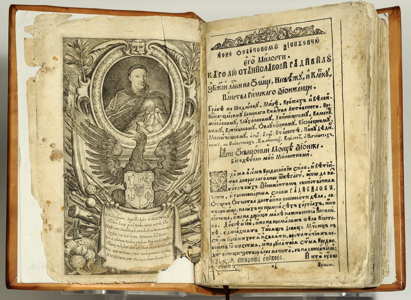 Супрасль. Літургікон, або Служэбнік (1692–1695). Выява Караля Станіслава Радзівіла